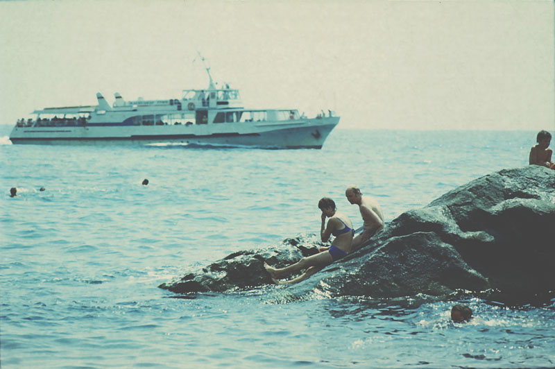 Yalta - 2 (80-ies).